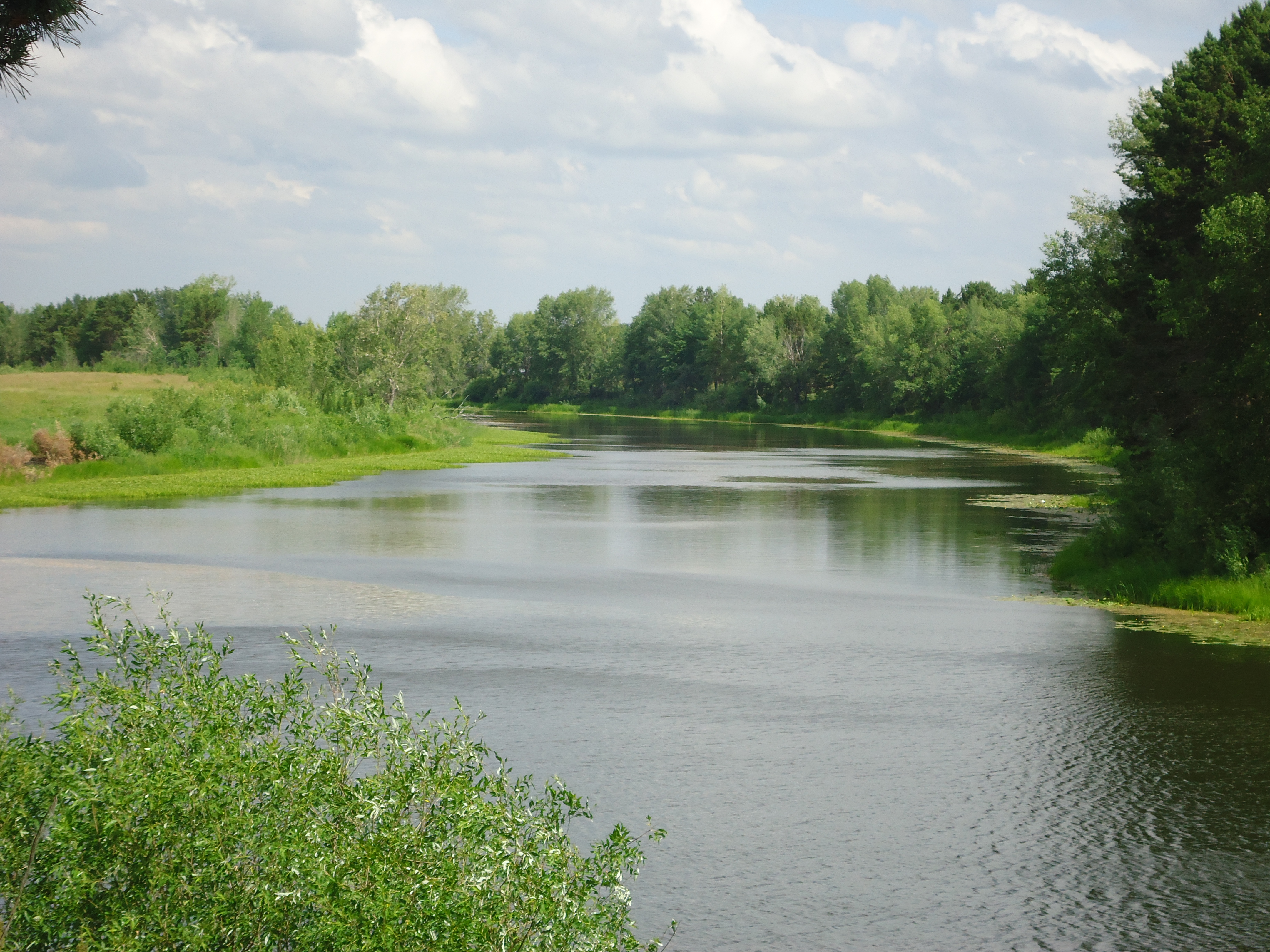 Народный парк: В юго-западной части г. Ишима, на левом берегу р. Ишим, с востока, севера и запада окружен старицей Ишимчик,Ишим, Тюменская область This image is related to the protected area of Russia number 7210062